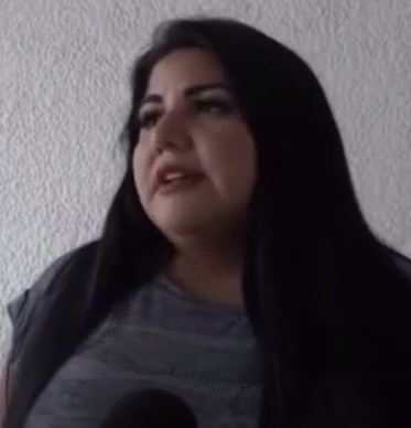 Jesica Echeverría durante una entrevista televisiva sobre denuncias de violación grupal en 2019